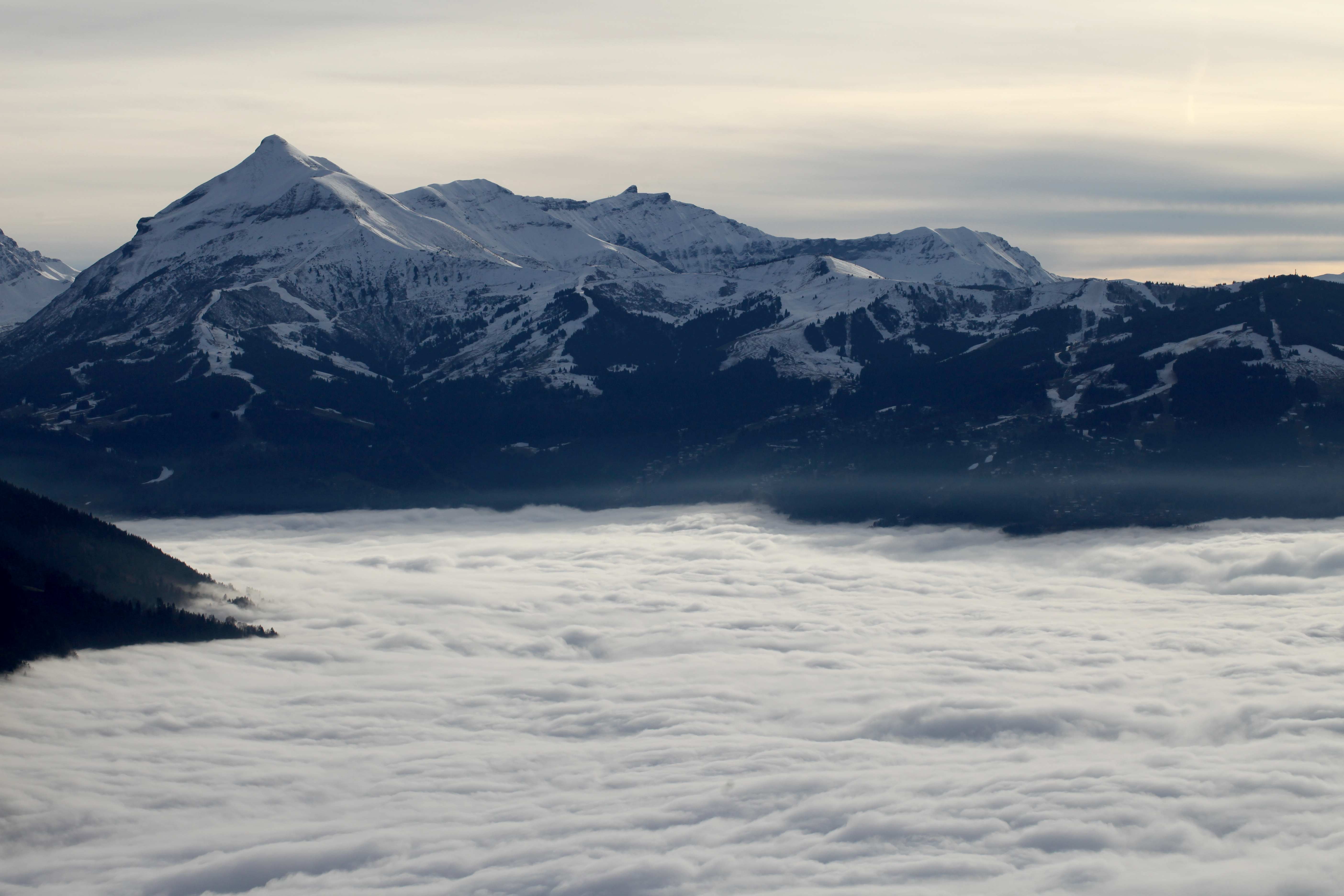 Le Mont Joly vu de Plaine-Joux.